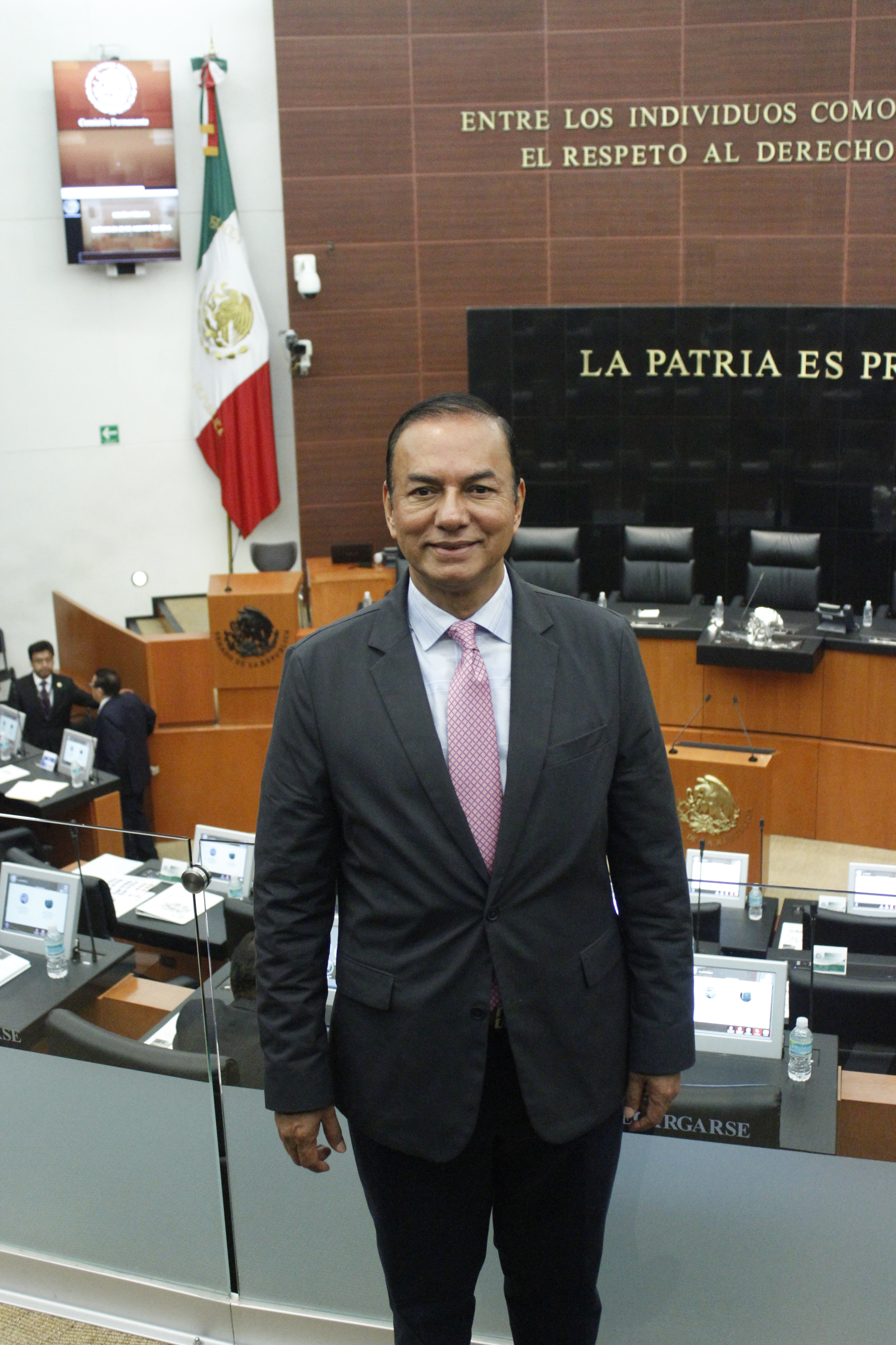 Mexican Politician